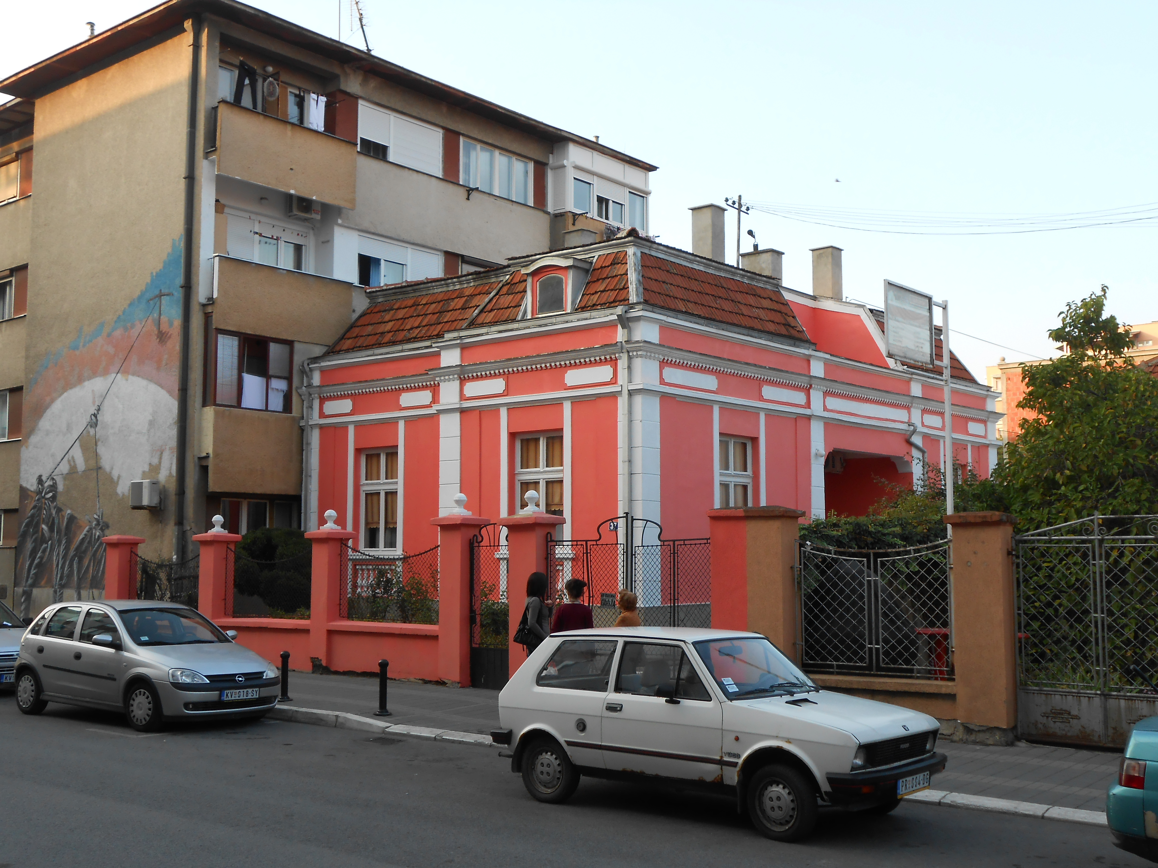 Petrovića kuća. Jedna od starijih kuća u Kraljevu. Nalazi se u samom centru grada, u ulici Cara Lazara 37.